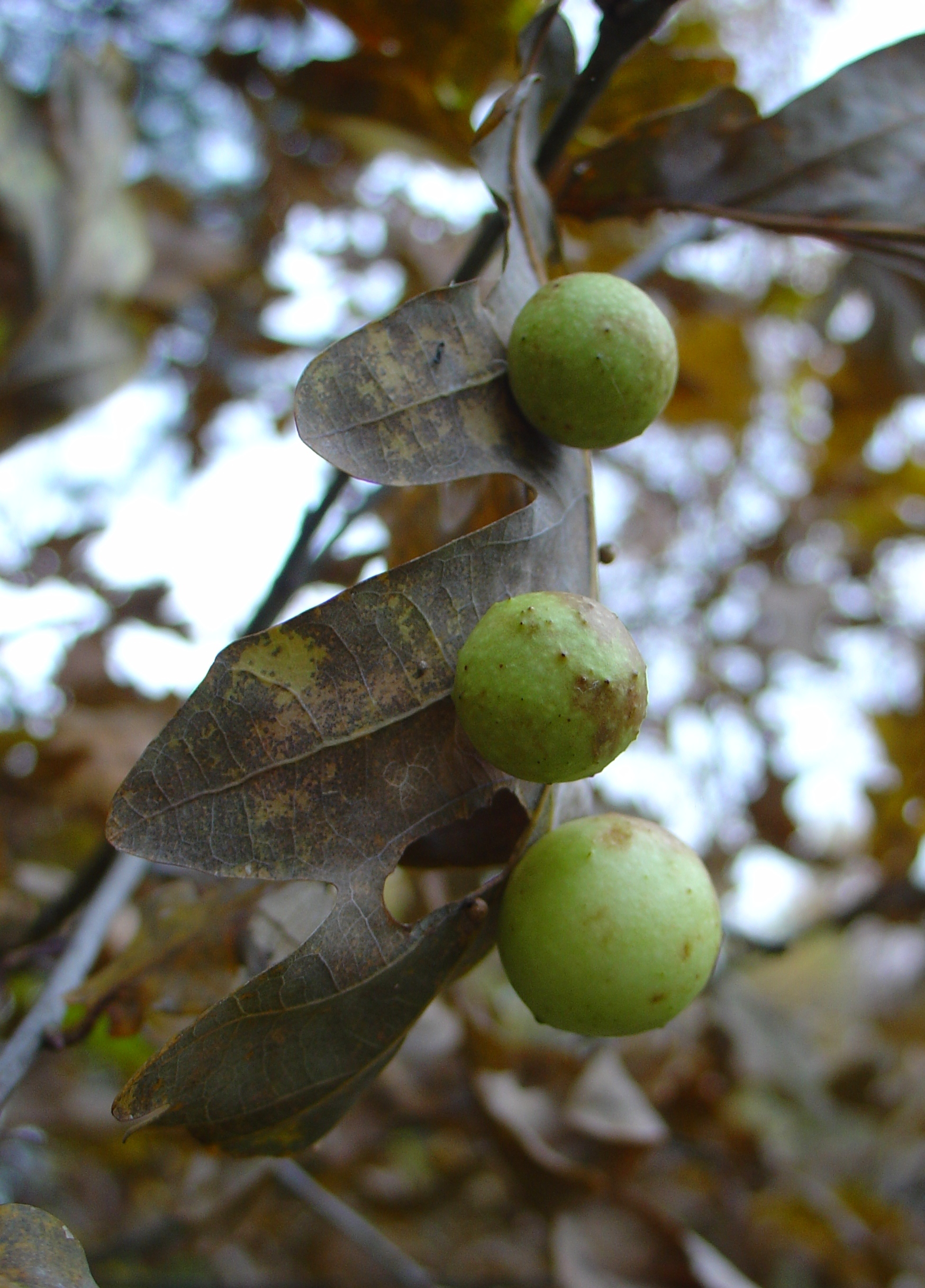 Cynips quercusfolii